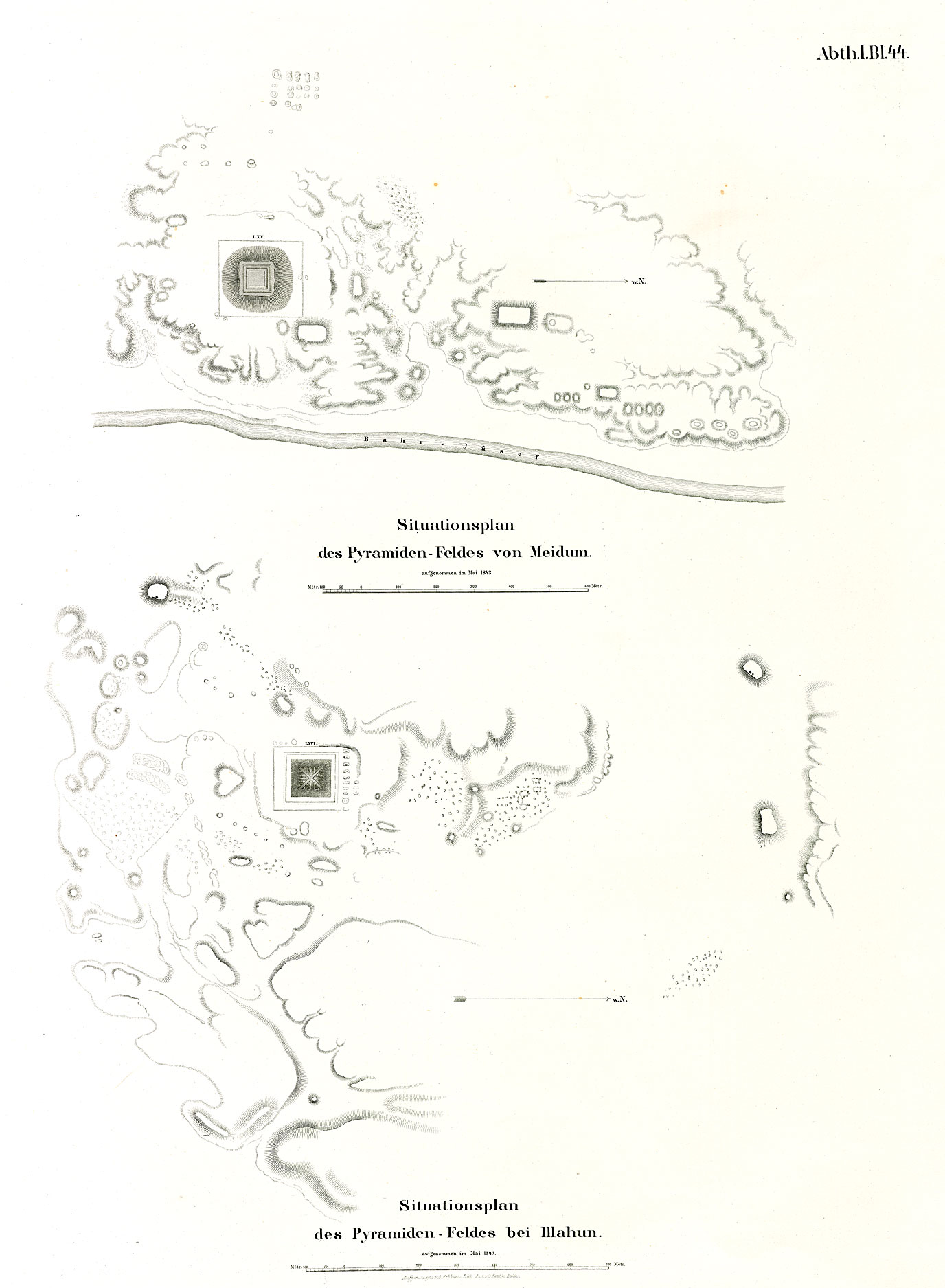 Denkmaeler aus Aegypten und Aethiopien nach den Zeichnungen der von Seiner Majestät dem Koenige von Preussen, Friedrich Wilhelm IV., nach diesen Ländern gesendeten, und in den Jahren 1842–1845 ausgeführten wissenschaftlichen Expedition auf Befehl Seiner Majestät